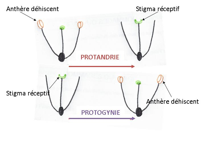 Dessins du processus de protandrie et progynie dans une plante à fleurs